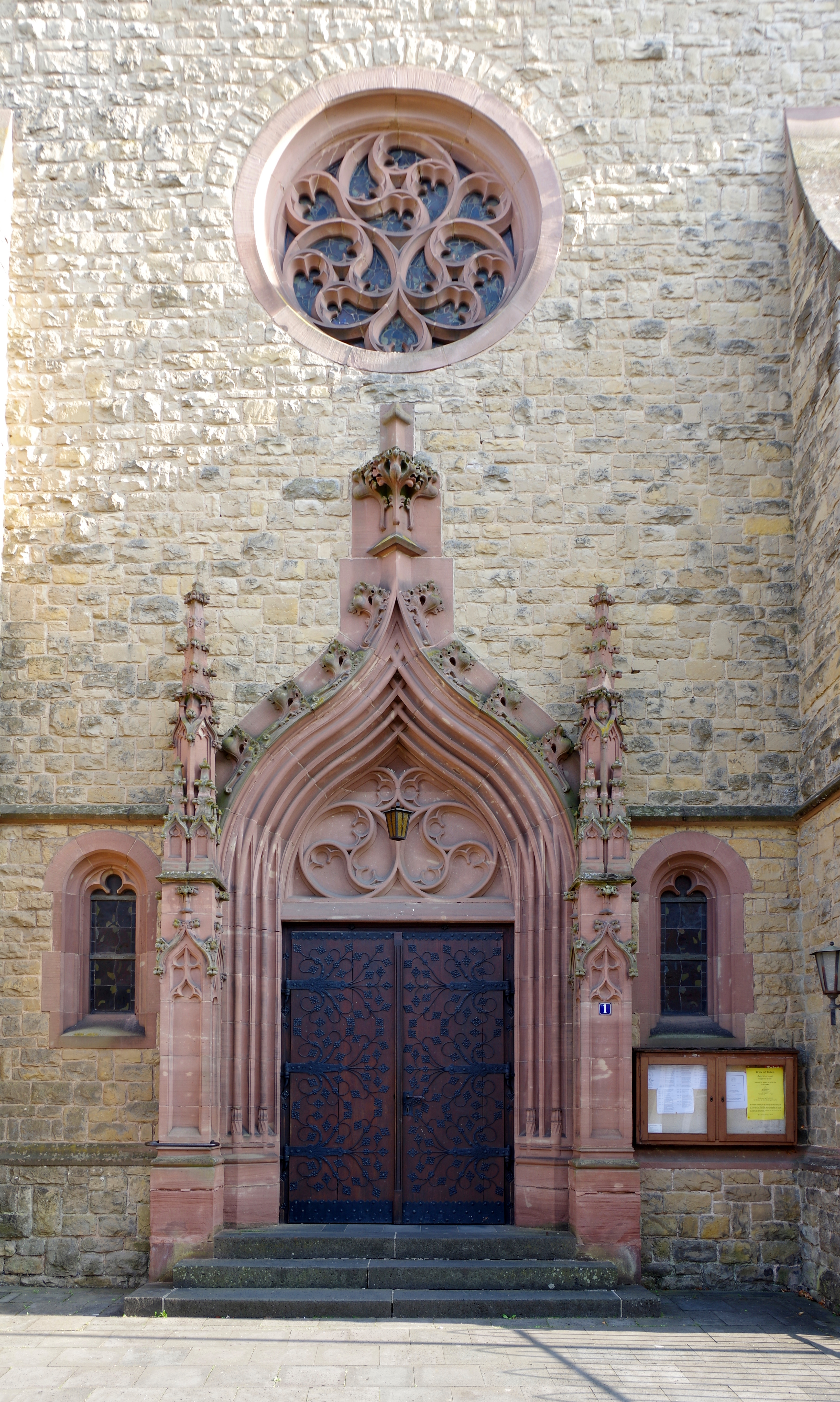 Wiltingen, Katholische Pfarrkirche St. Martin, Portal